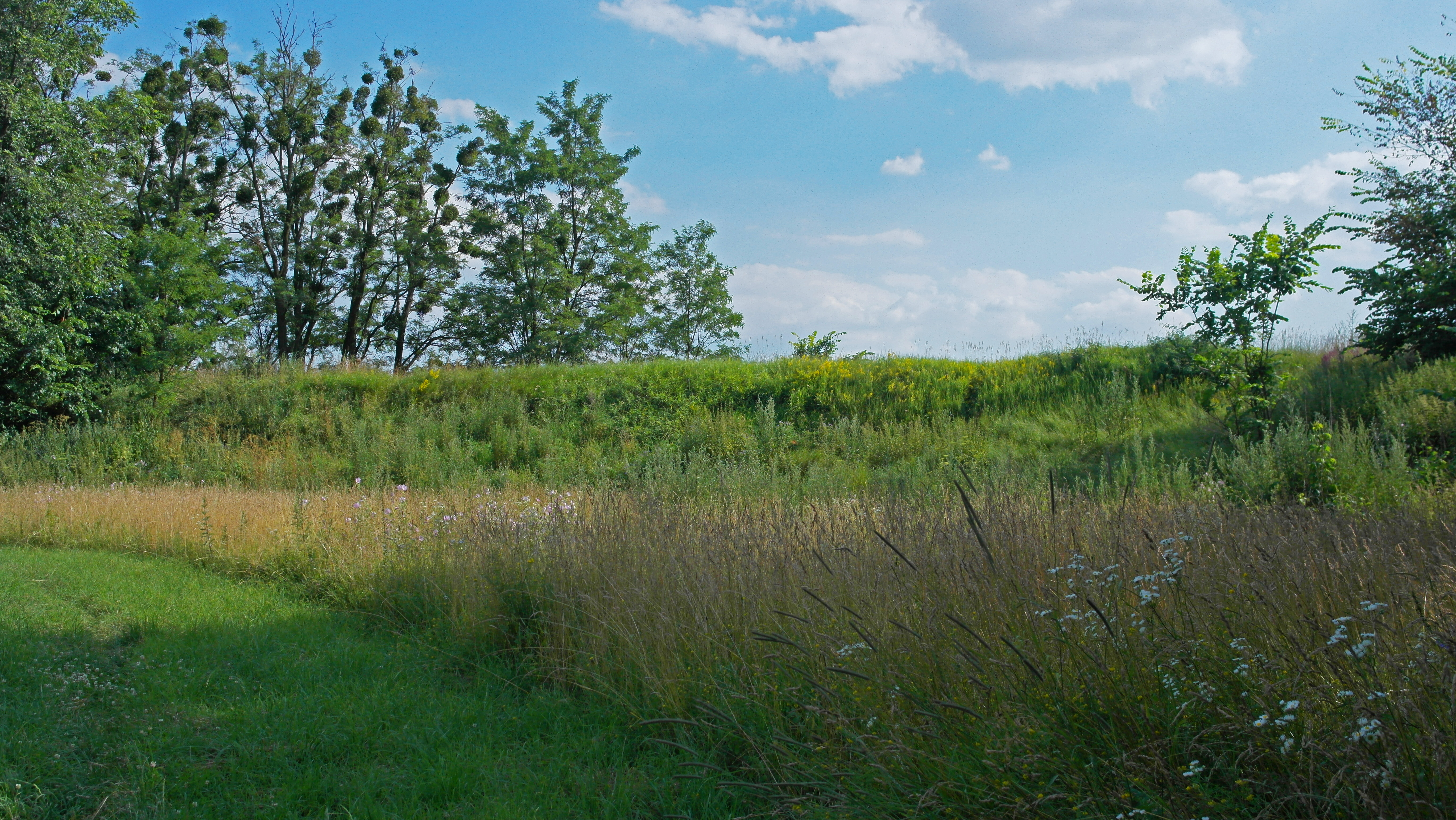 Змієвий Вал, с. Мотижин, На Зх краю села